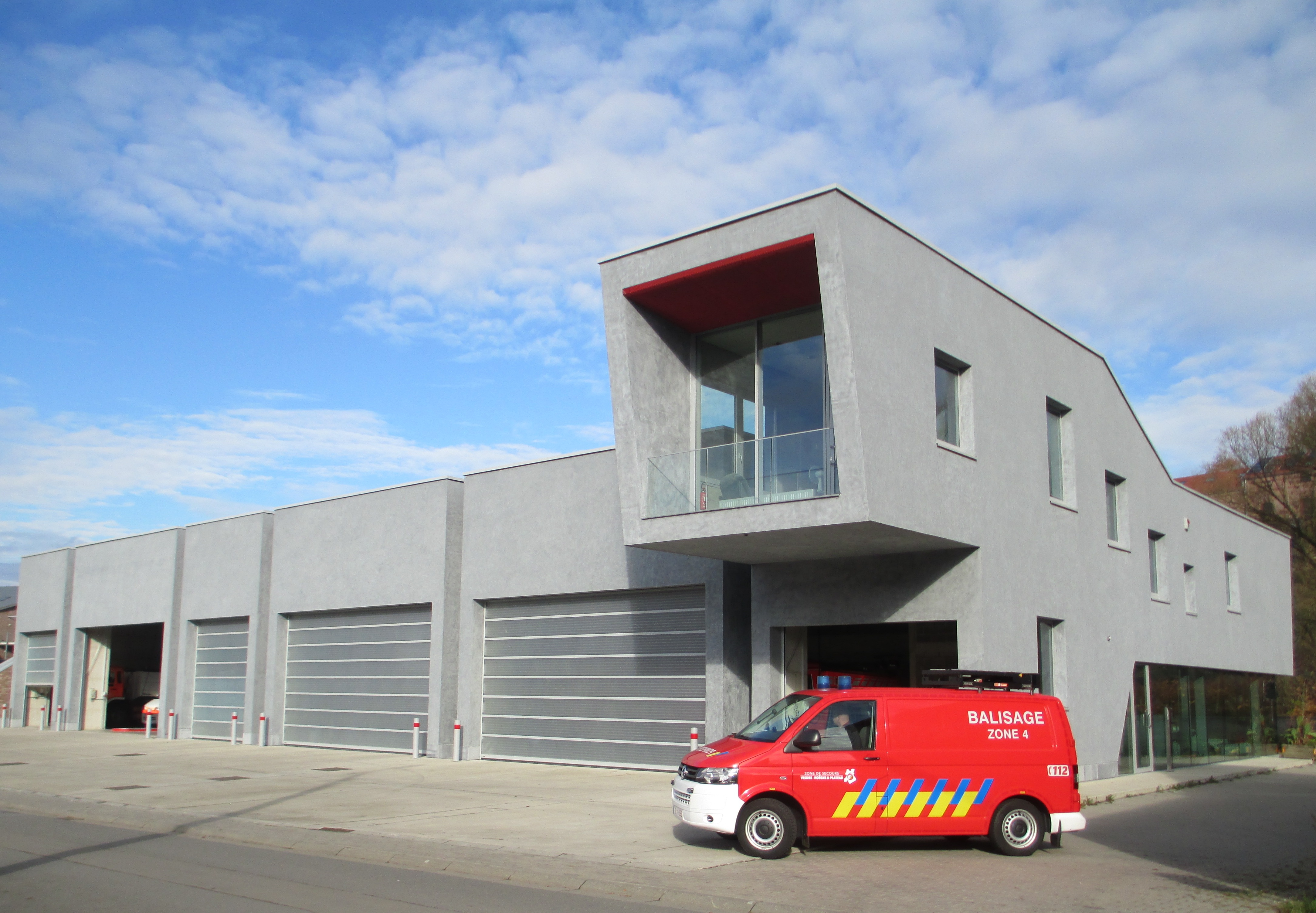 La caserne des pompiers de Theux est la caserne la plus moderne de la zone de secours 4 "Vesdre-Hoëgne et Plateau". Au rez-de-chaussée, les garages sont alignés à l’avant du bâtiment, l’arrière étant réservé aux locaux techniques, de stockage, et aux douches qui manquaient dans l’ancienne caserne. L’étage regroupe le bureau du commandant, le local radio digitalisé et les pièces de vie parfaitement adaptées (dortoirs, salles de sport, cuisine, salle de cours). Le véhicule de signalisation compact visible à l’avant-plan, appelé véhicule de balisage, est capable d’amener rapidement deux personnes sur les lieux d’un accident de la route. Sur le toit, il est équipé d’un panneau basculant qui peut indiquer par une flèche lumineuse la direction à suivre pour les véhicules venant de l’arrière. Des compartiments sont installés dans la partie fourgon du véhicule et permettent de ranger du matériel de signalisation comme un diable, des cônes et des lampes, des bâtons de signalisation, une brosse, une pelle, etc.